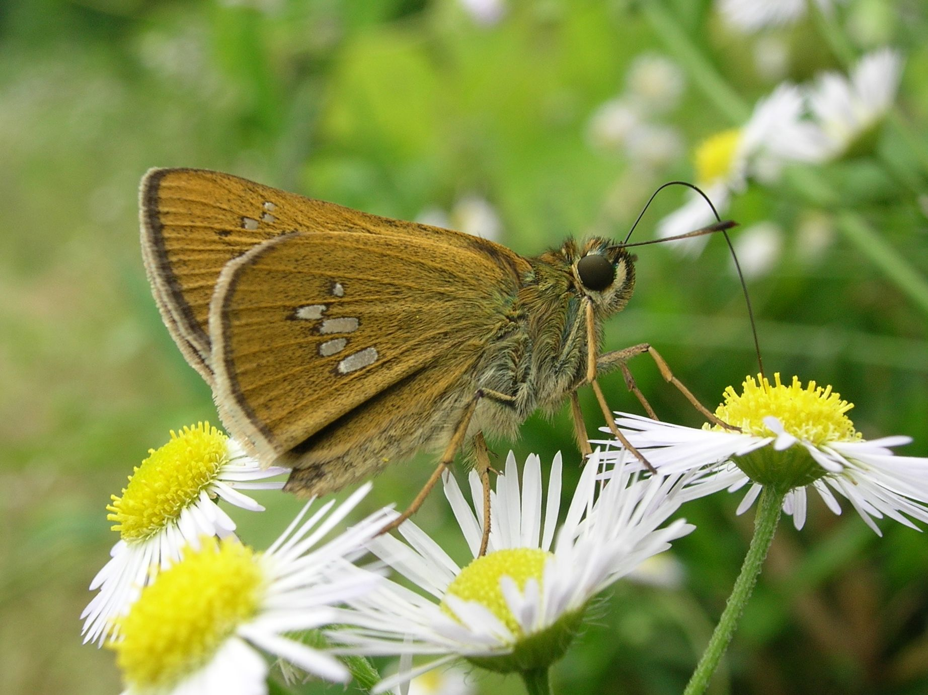 文言: ヒメジョオンで吸蜜するオオチャバネセセリ